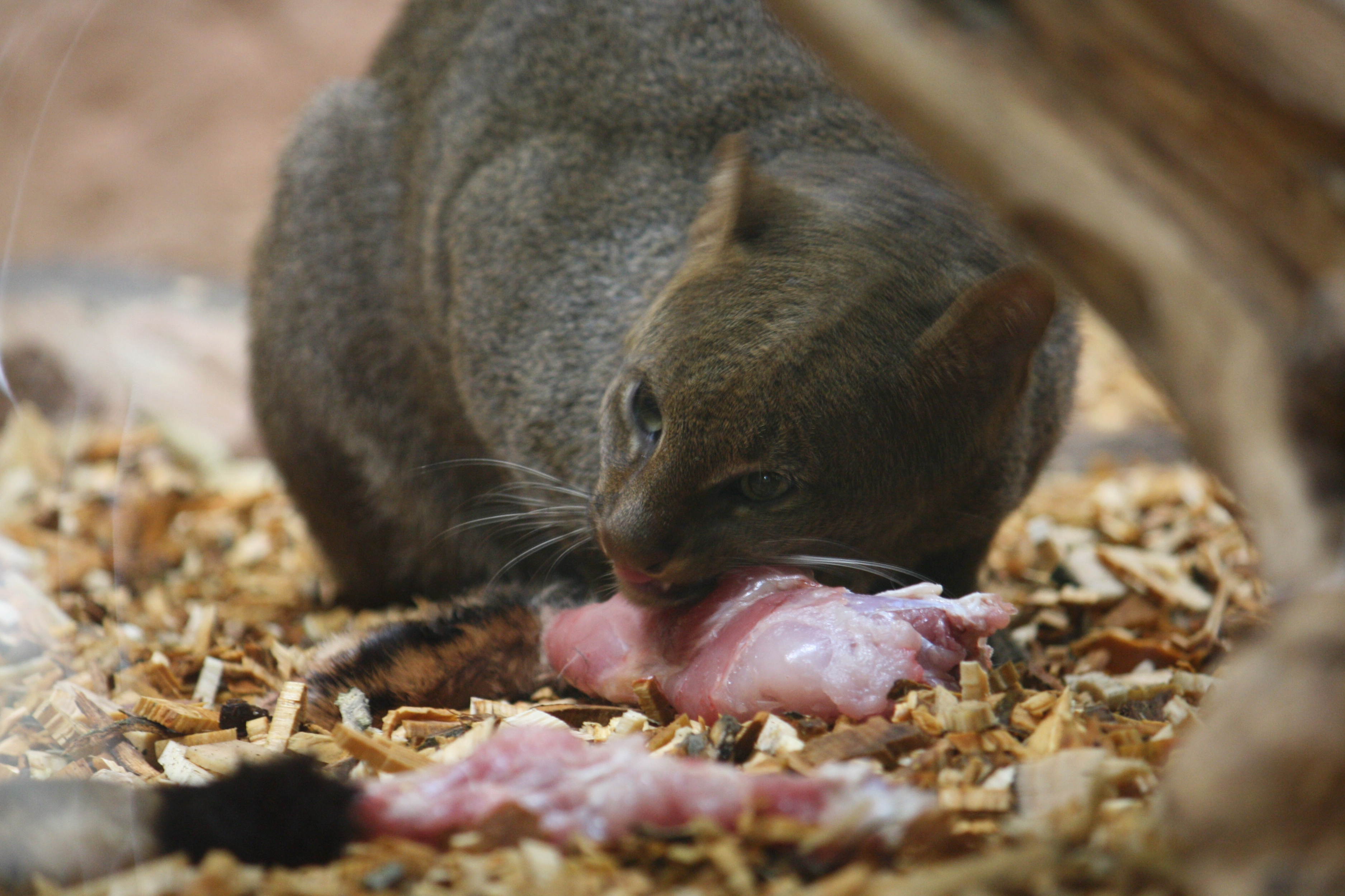 Jaguarundi v pražské Zoo